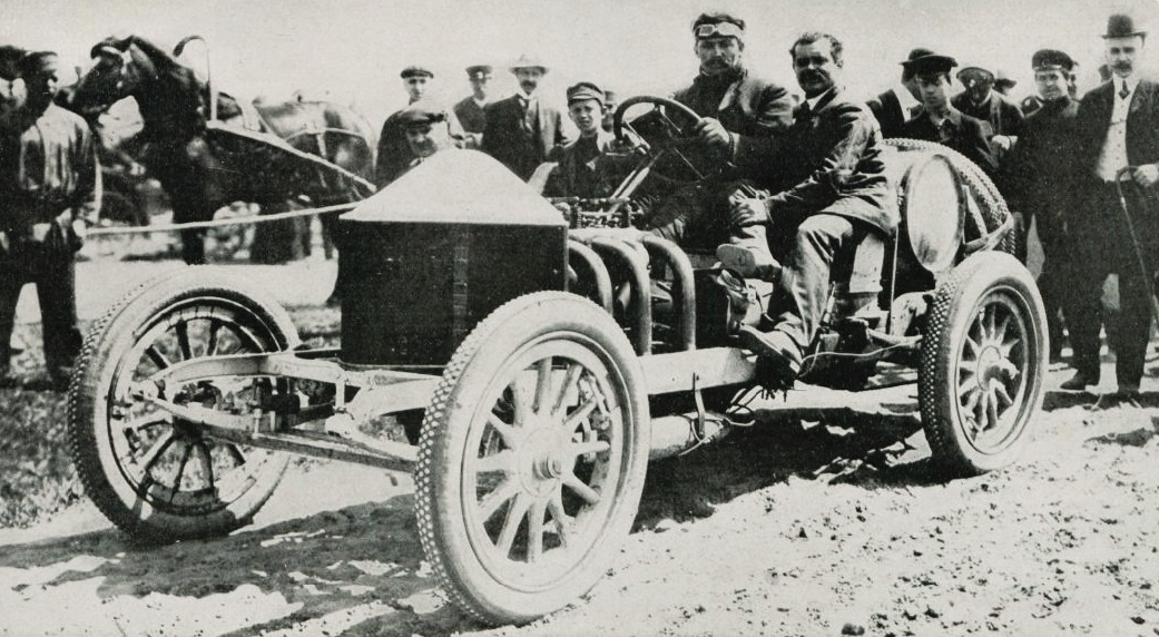 Victor Demogeot, deuxième sur Darracq de la seconde édition de Saint-Pétersbourg-Moscou, en 1908 - La Vie au Grand Air du 4 juillet 1908, p.11